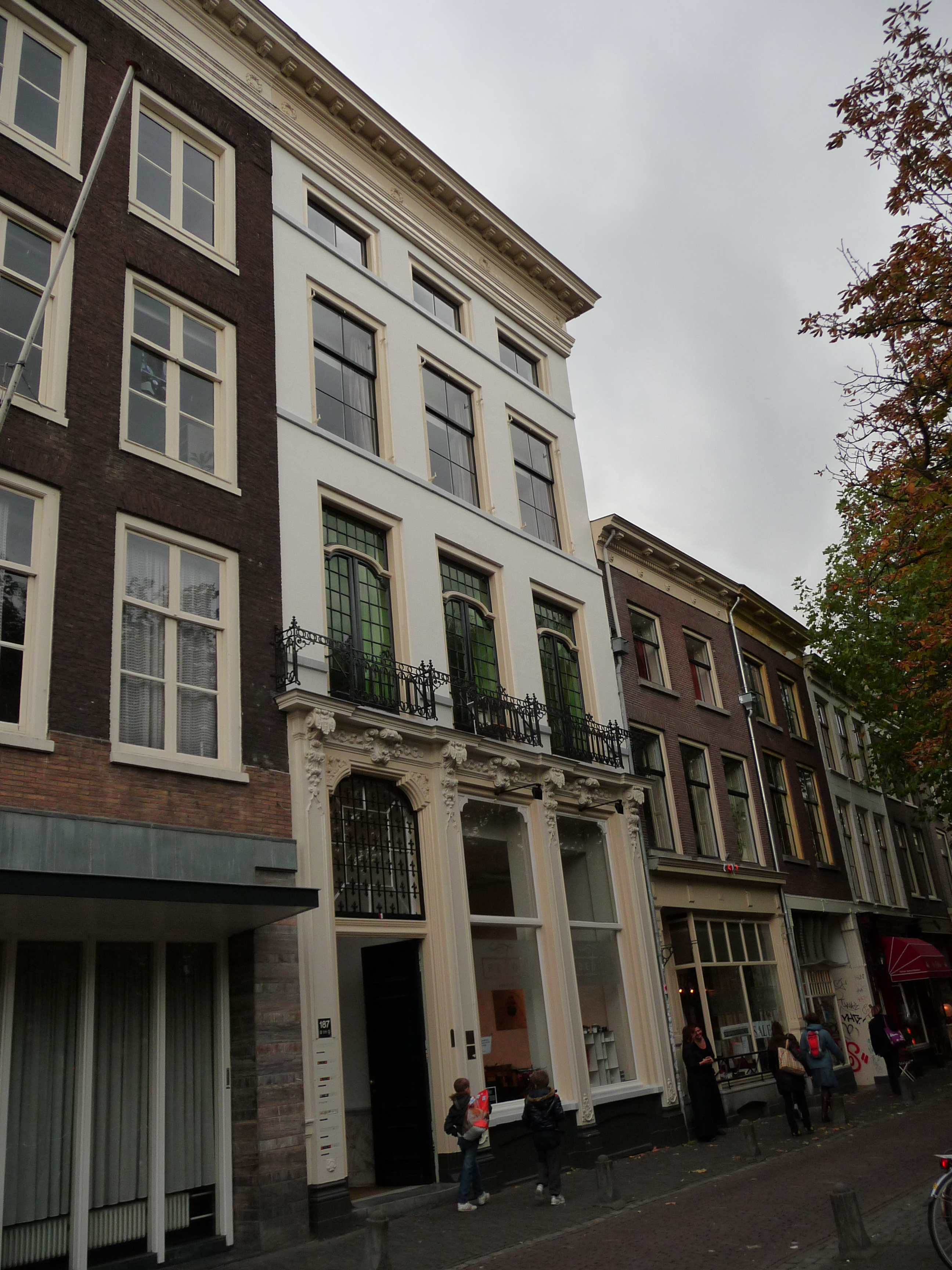 Rijksmonument aan de Oudegracht in Utrecht (stad)